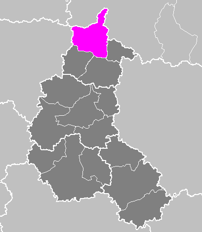 Maps of arrondissements and cantons of France: Arrondissement de Charleville-Mézières.PNG